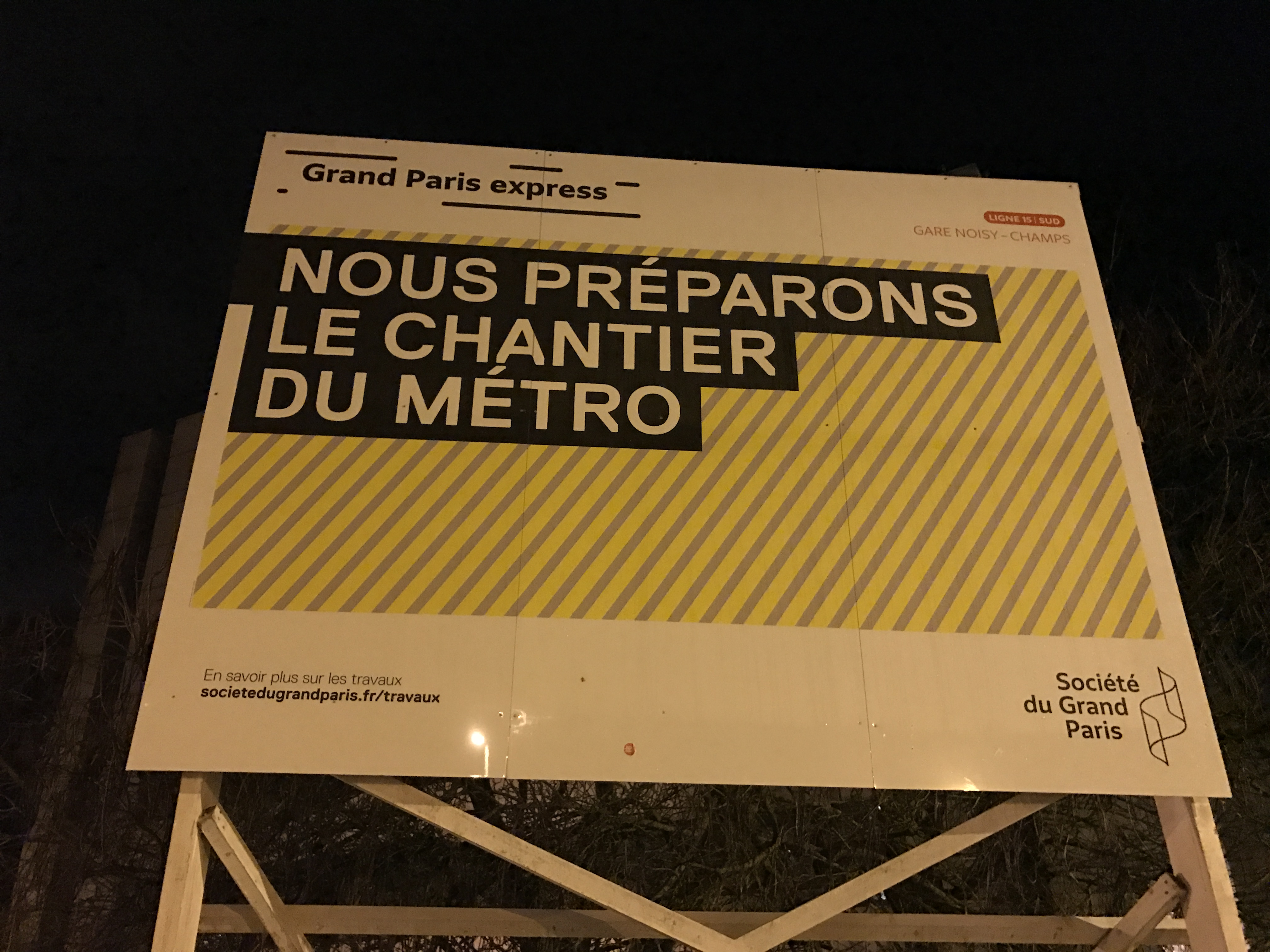 Panneau "Nous préparons le chantier du métro" près de la gare de Noisy - Champs.